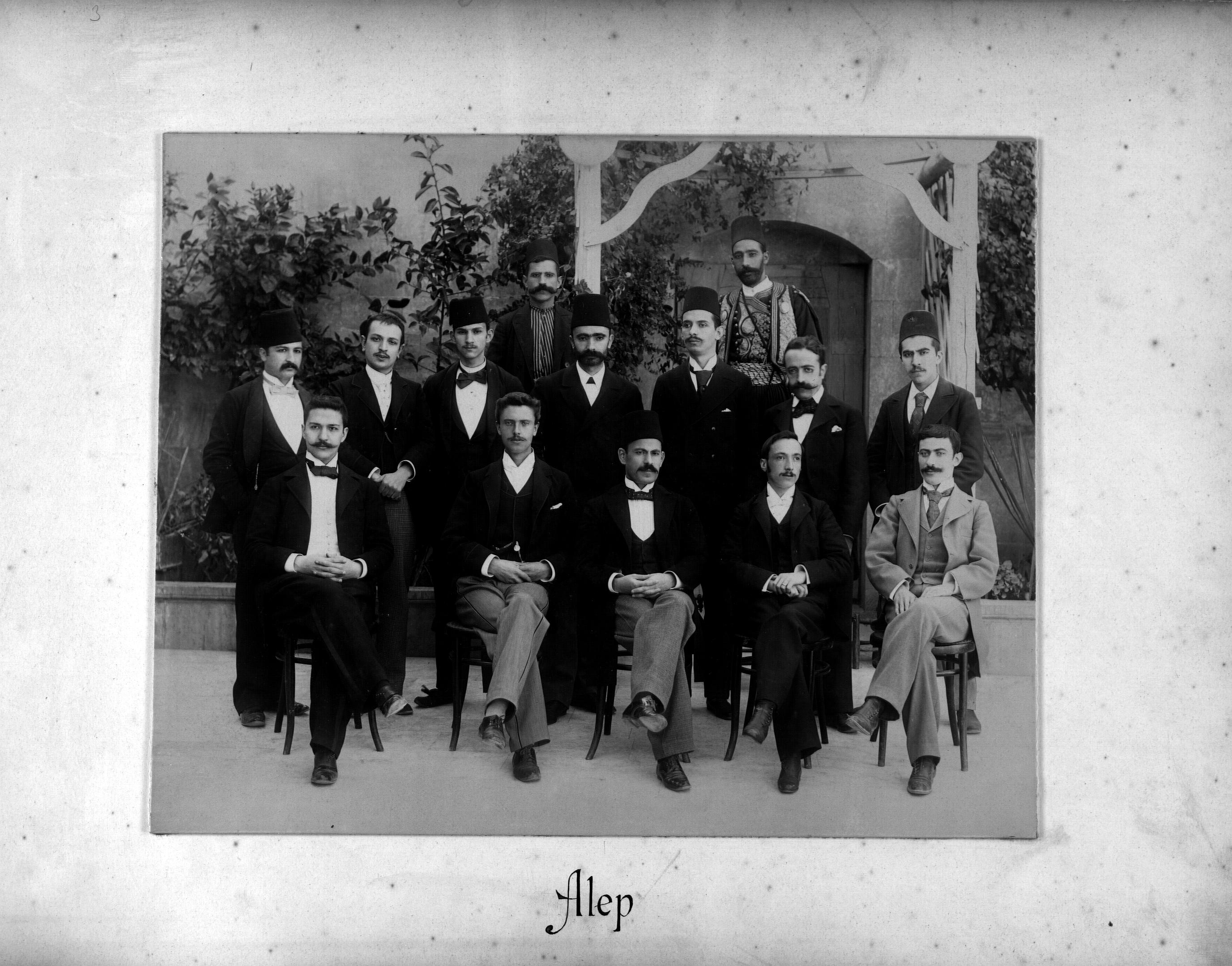 From the 1895 Ottoman Bank Branches Album Aleppo branch personnel SALT Research, Ottoman Bank Archives 1895 tarihli Osmanlı Bankası Şubeler Albümü’nden Halep şubesi personeli SALT Araştırma, Osmanlı Bankası Arşivleri